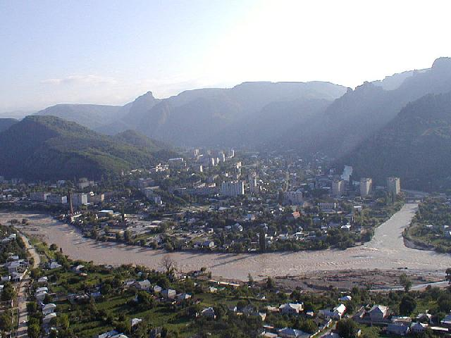 Къарачай шахар эки суу арасы ; Karachayevsk à la confluence du Kouban et de la Teberda